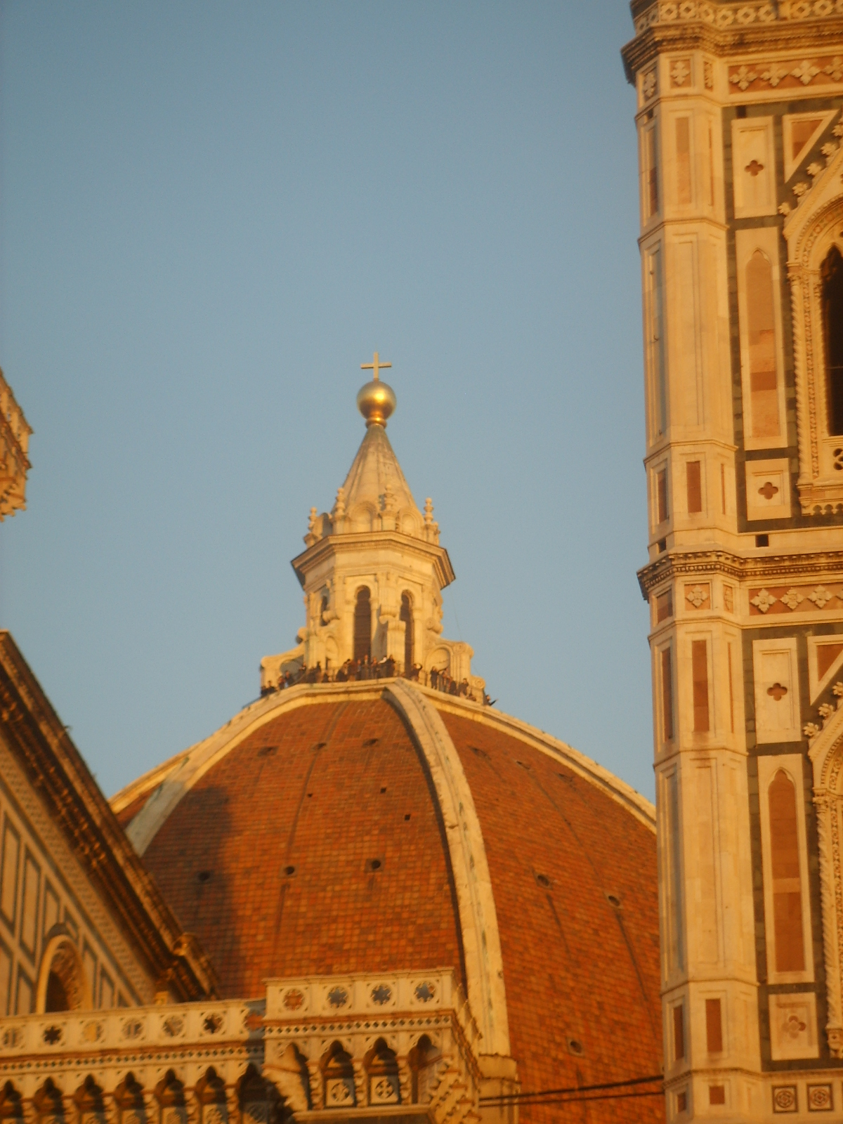 Santa maria del fiore, lantern in Florence, Italy